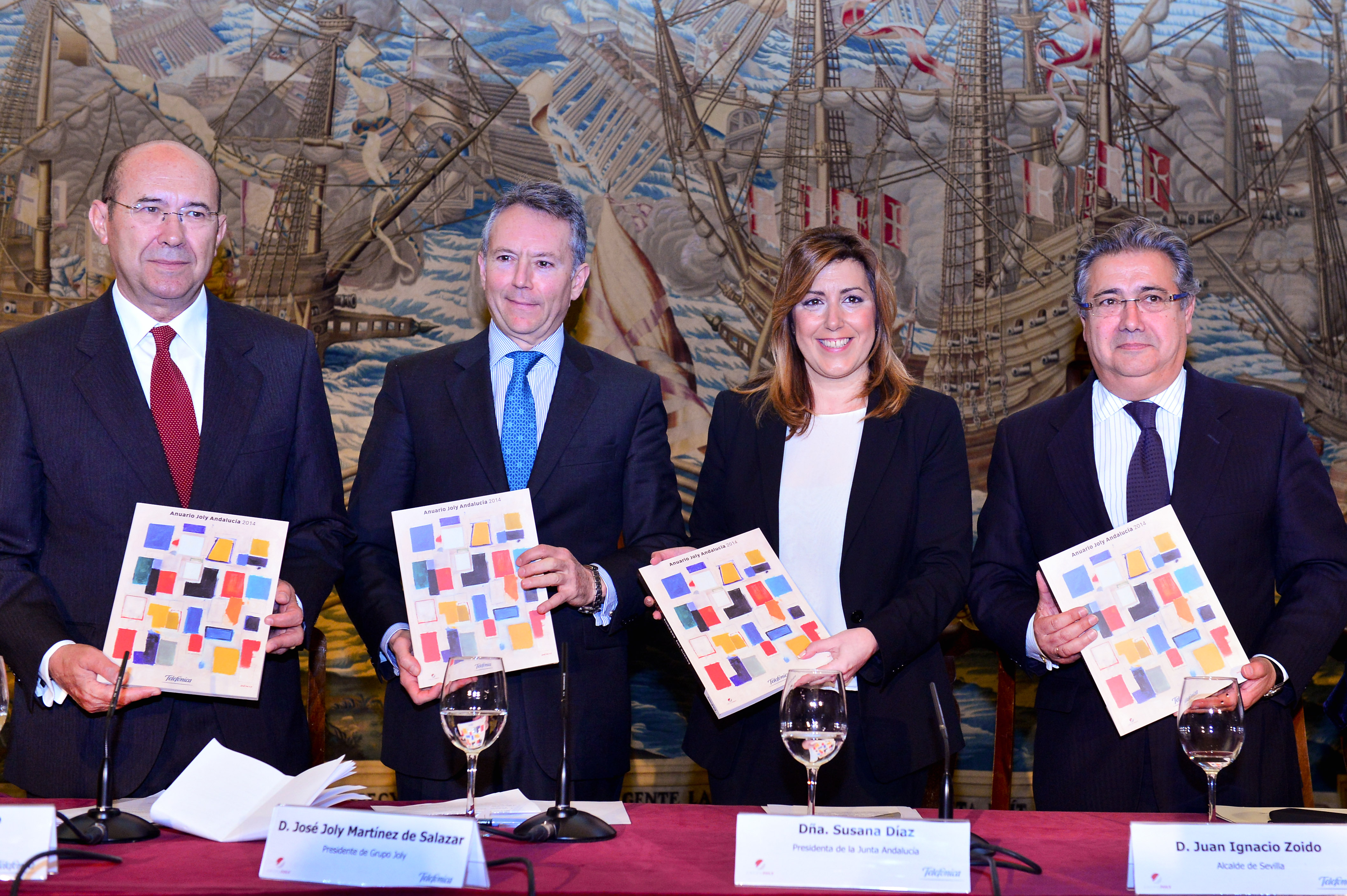 Presentación del Anuario del Grupo Joly en marzo de 2014. De izquierda a derecha Francisco Ferraro, director del Anuario Joly Andalucía, José Joly Martínez de Salazar, presidente del Grupo Joly, Susana Díaz, presidenta de la Junta de Andalucía y Juan Ignacio Zoido, Alcalde de Sevilla